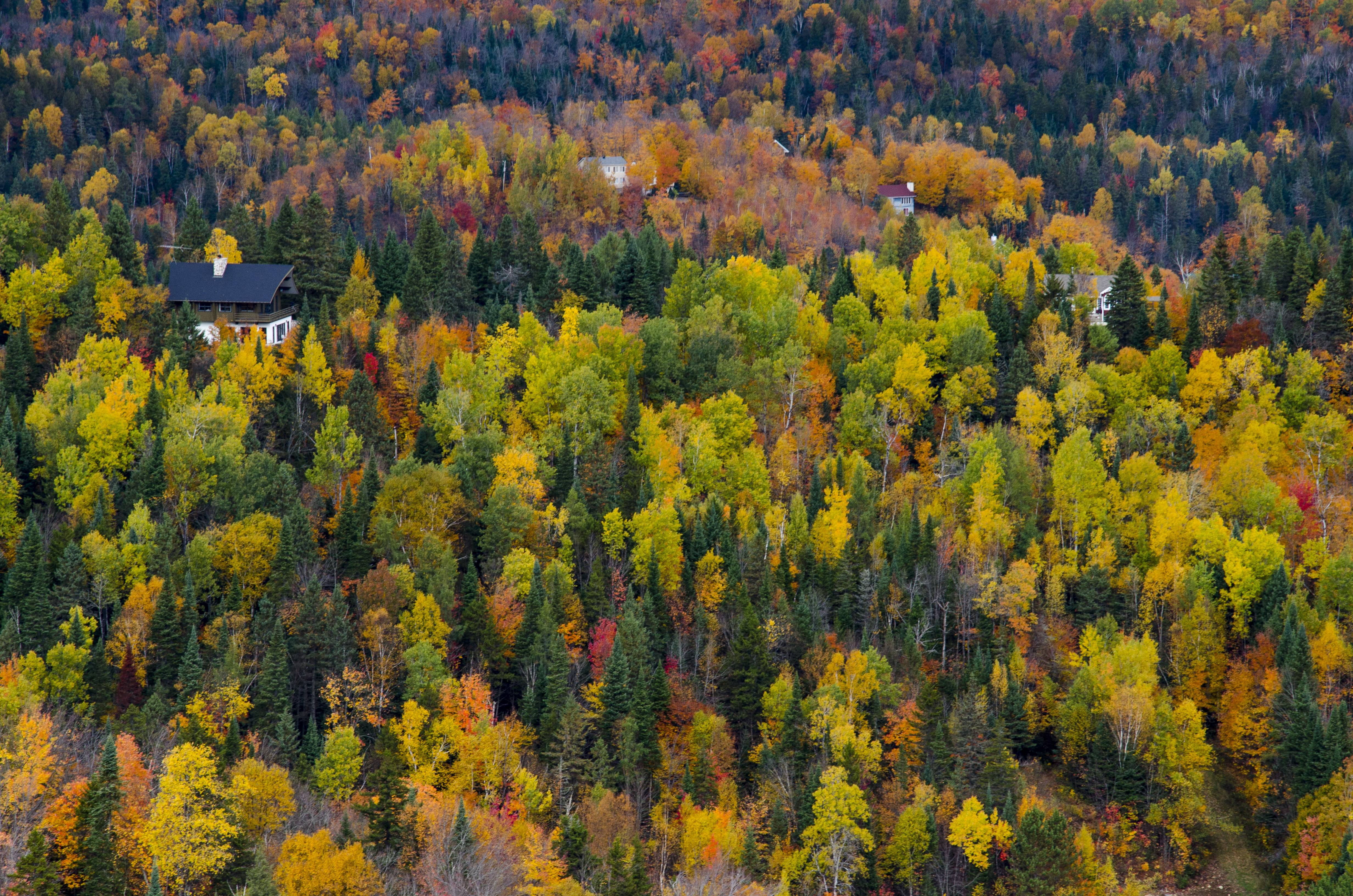 L'automne au Québec